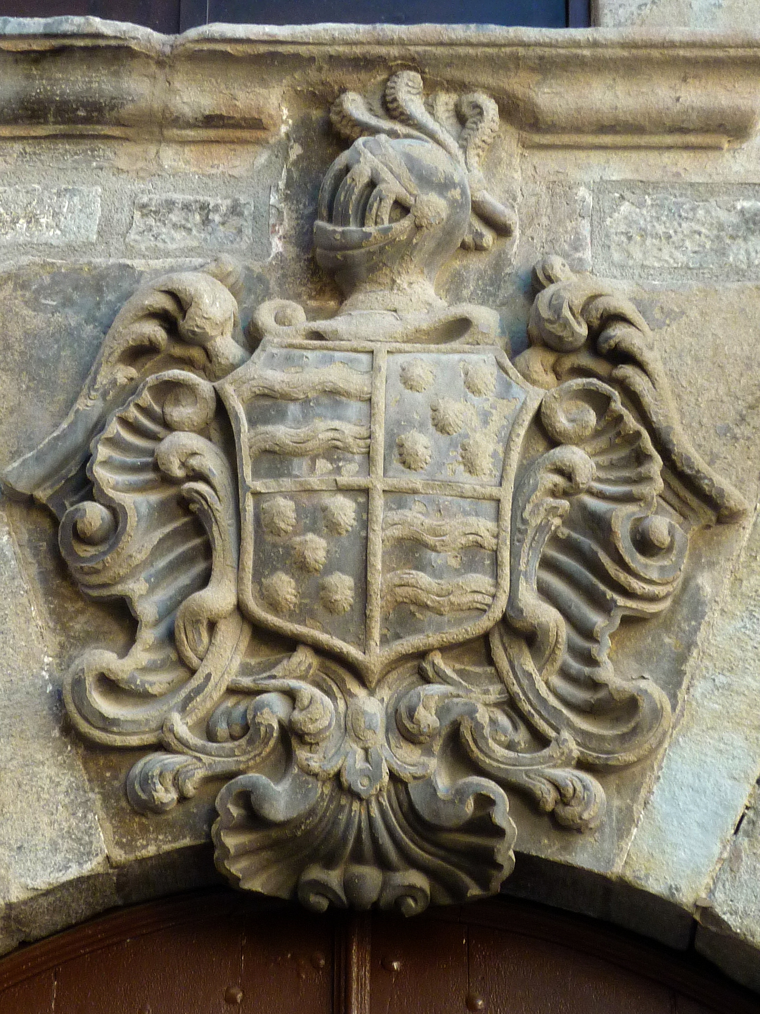 Cal Cabanes (Solsona): escut sobre el portal